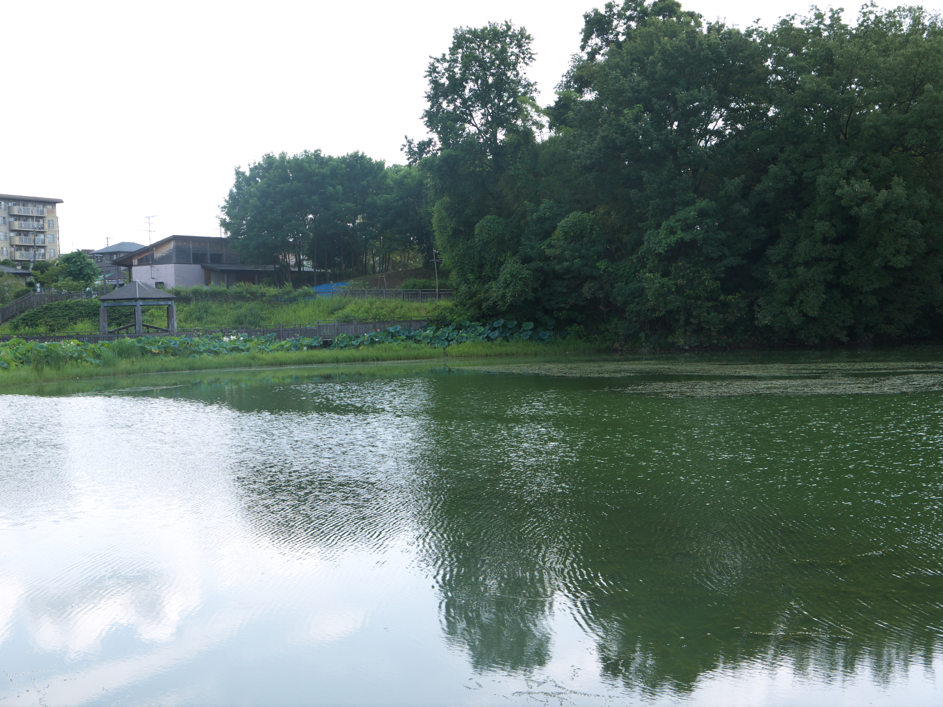 長池オアシス長池眺望